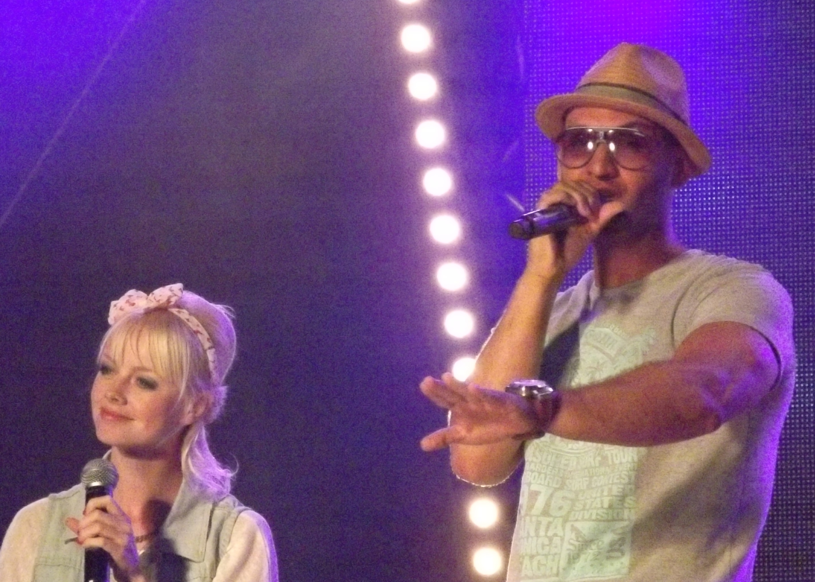 Charlotte (Leysen) en Brahim (Attaeb) tijdens de uitreiking van de Radio 2 Zomerhit-award op 17 augustus 2012 in Middelkerke-Westende